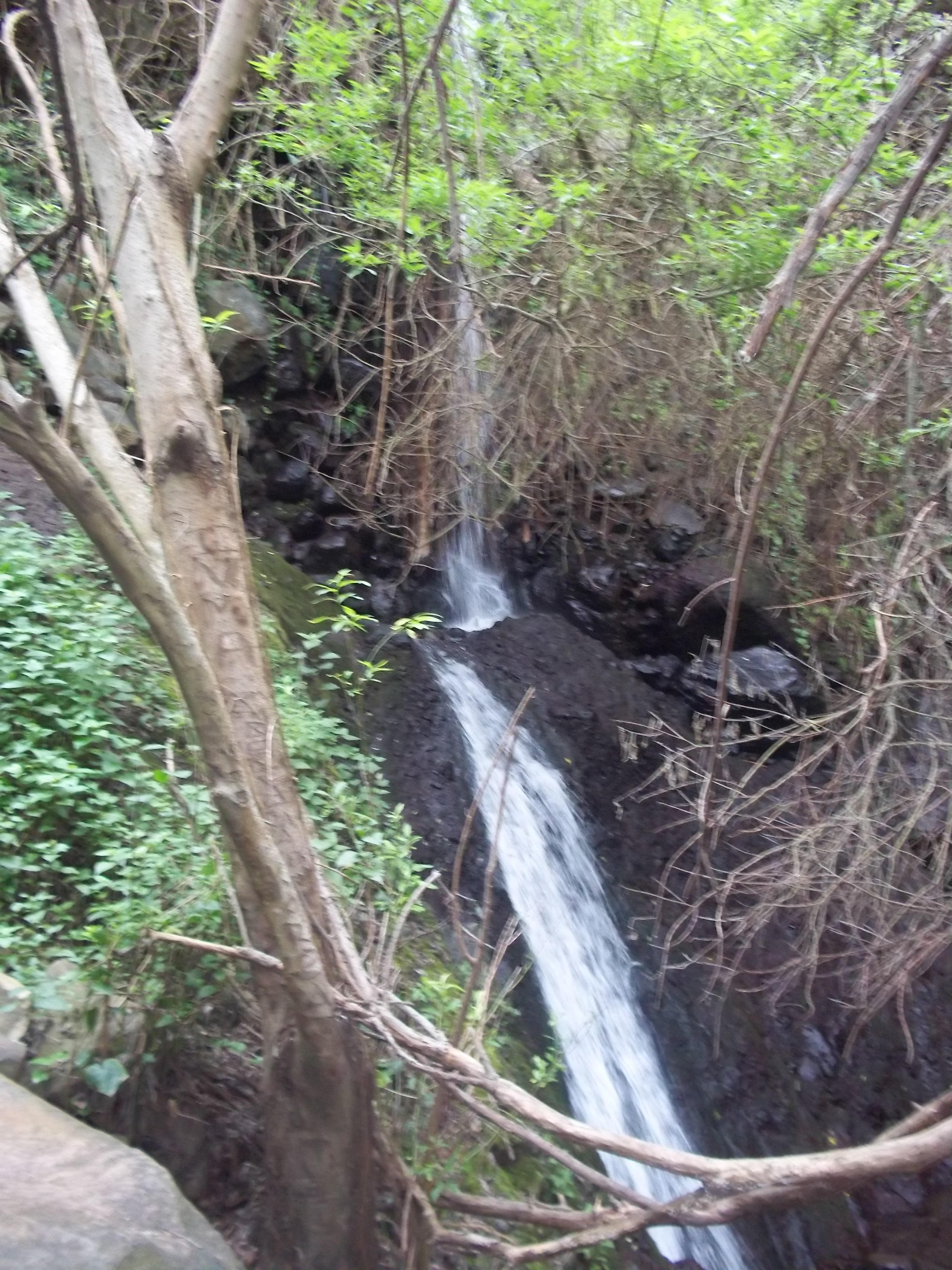 Cascada del precioso Barranco de Los Cernícalos